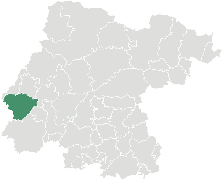 Ubicación del Municipio de Ciudad Manuel Doblado en el Estado de Guanajuato, México.